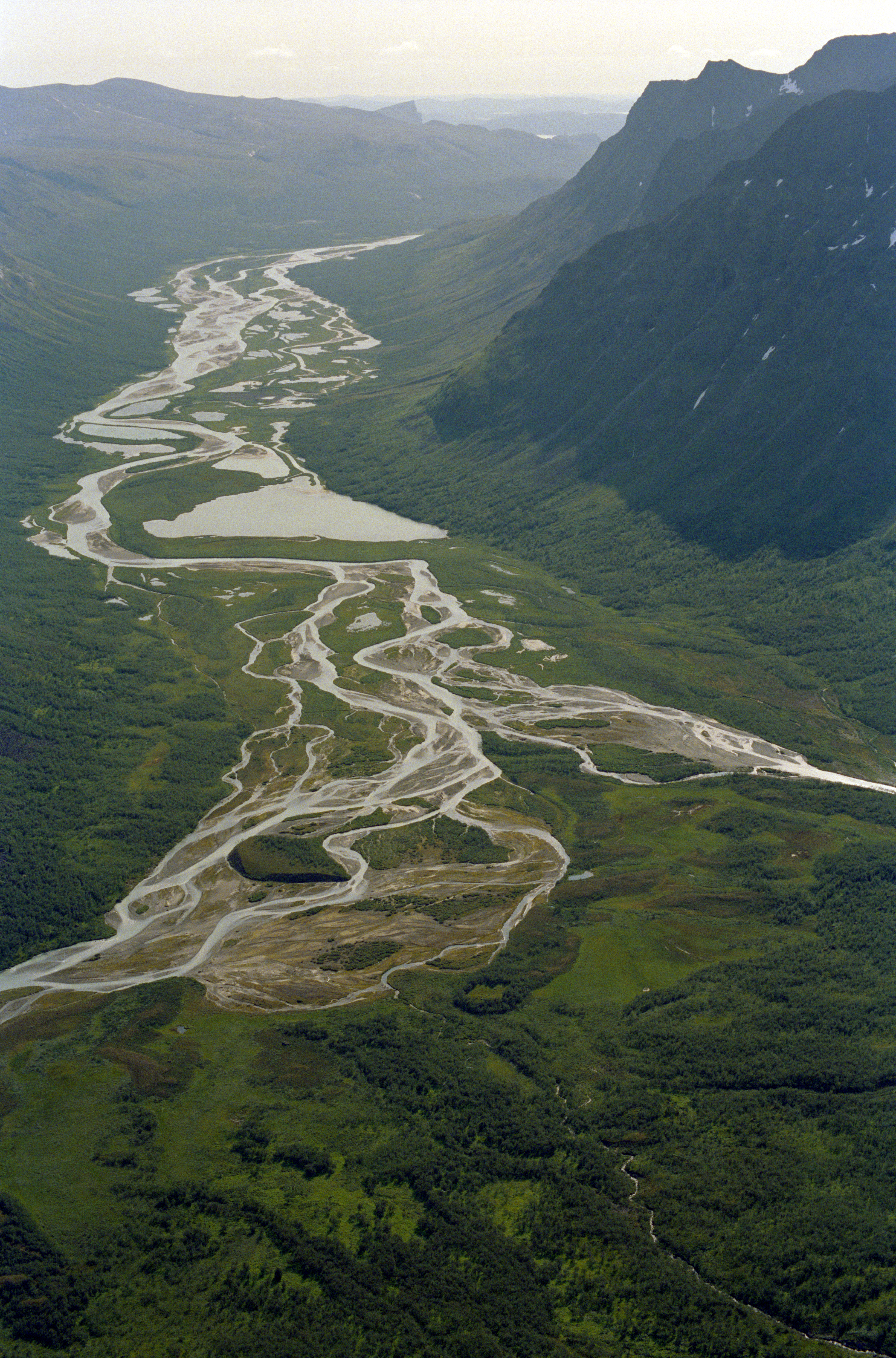 Rapadalen från Tielmaskaite (Dielmmá), mot sydöst. Laponia